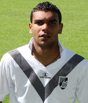 Soudani sous le maillot du Vitoria Guimaraes